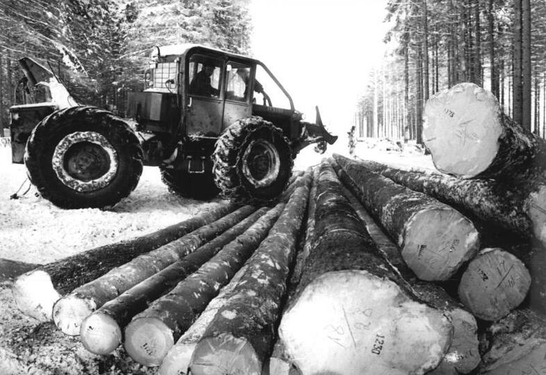 Schwarzenberg, Räumen von Holz ADN-ZB Thieme 25.2.1983 Bez. Karl-Marx-Stadt: Forst und Schnee erschweren derzeit die Arbeit der Werktätigen des Staatlichen Forstwirtschaftsbetriebes Schwarzenberg. Trotzdem werden täglich die Planziele realisiert. Mit dem knickgelenkten Spezialrücketraktor wird das Langholz gerückt. - siehe auch 1983-0225-4 und 6N